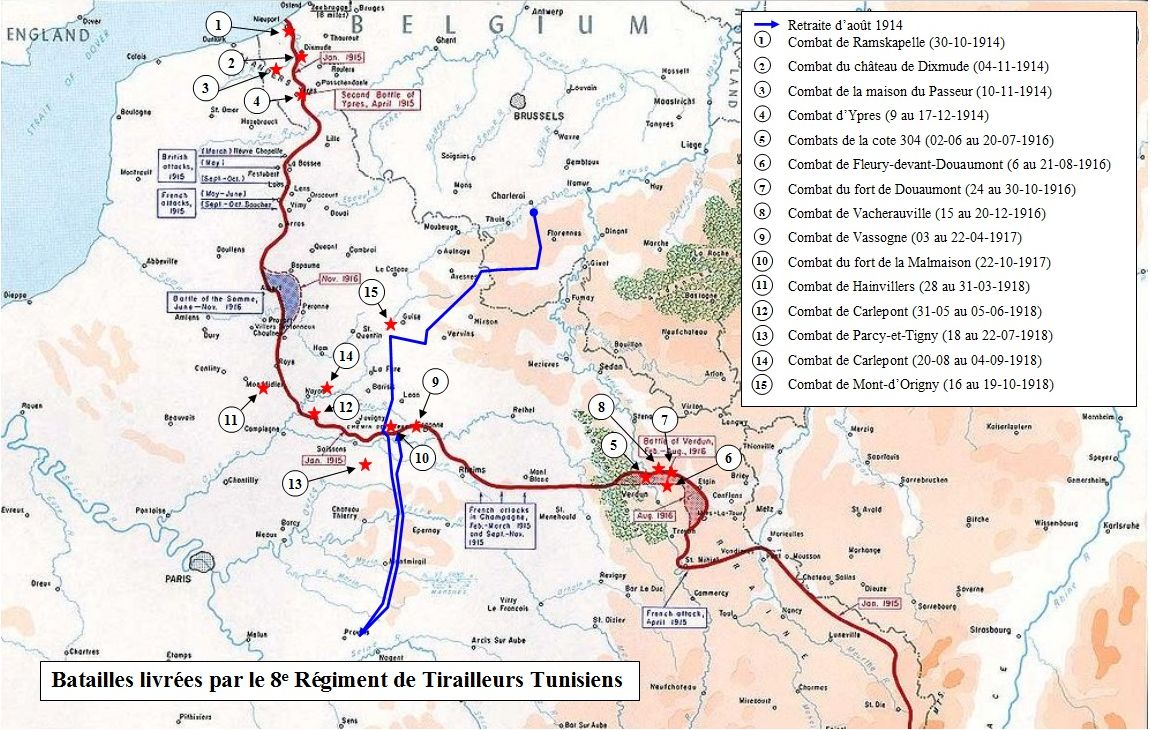 Campagne du 8e Régiment de Tirailleurs Tunisiens (8e RTT) pendant la 1ère Guerre Mondiale